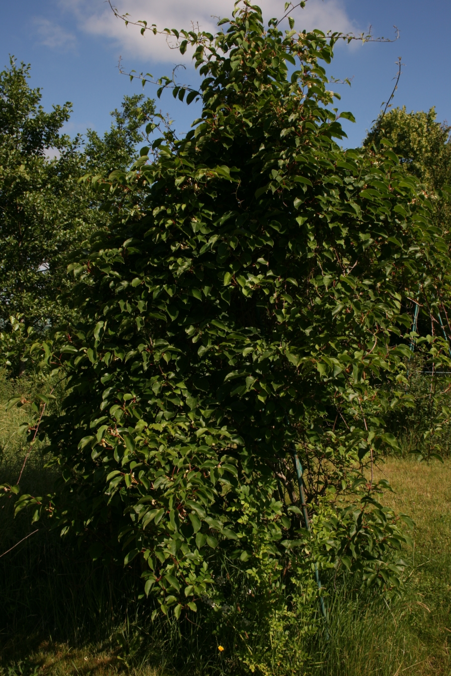 Actinidia arguta (cv. 'Ananaskaya'): Habit